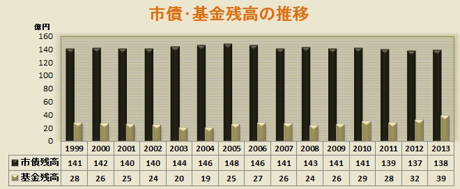 1999年以降における見附市の一般会計決算･市債残高の推移